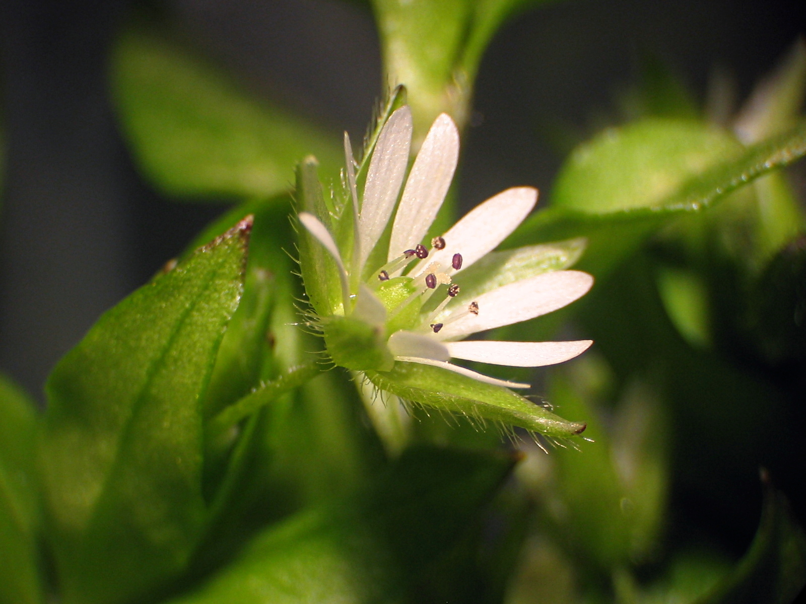 Stellaria media under 10x stereomicroscope